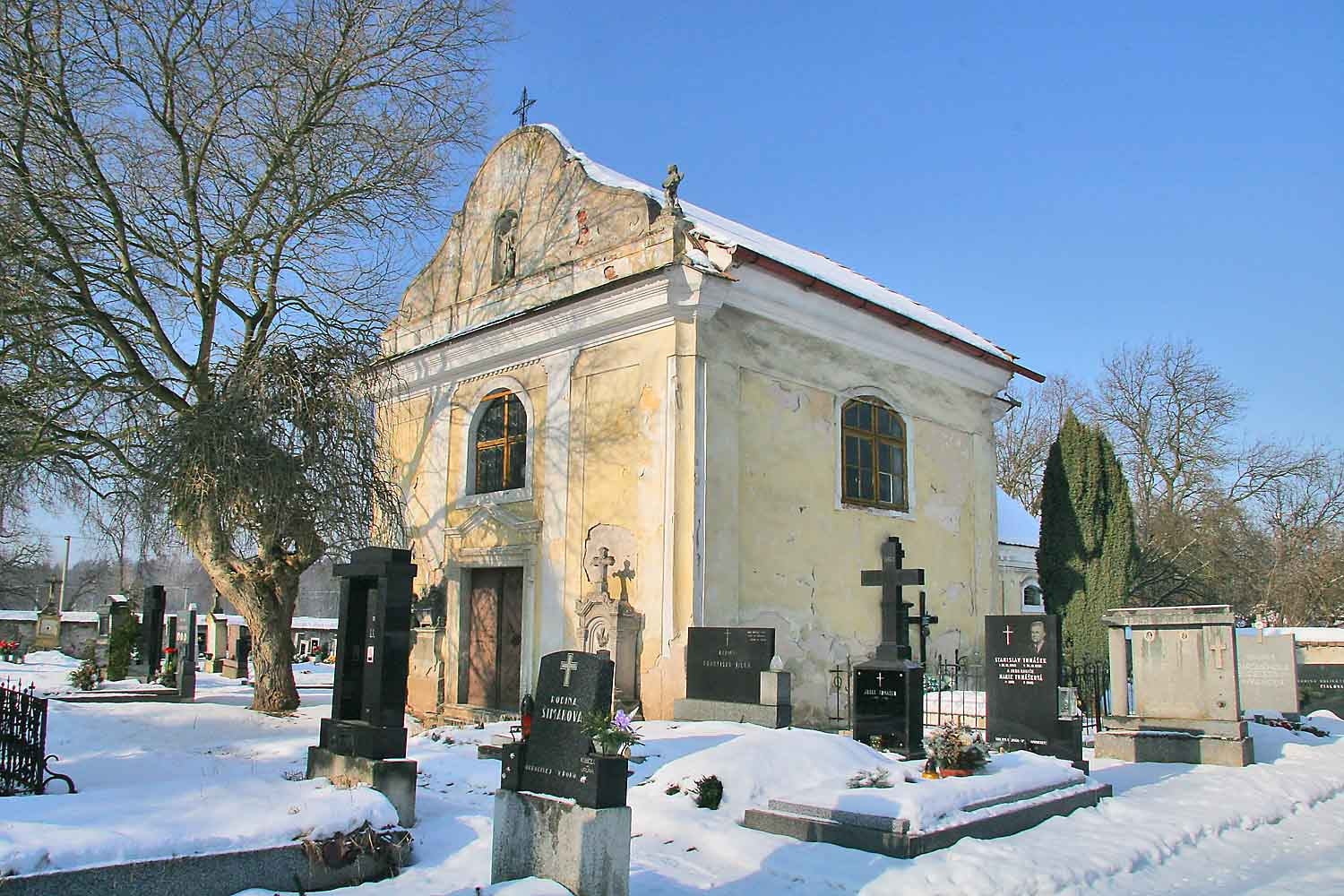 Hřbitovní kostel sv. Kříže / Cemetery church of the Holy Cross, Kladruby nad Labem, Pardubice District, Czech Republic Autor:Prazak Date: 6. 2. 2006